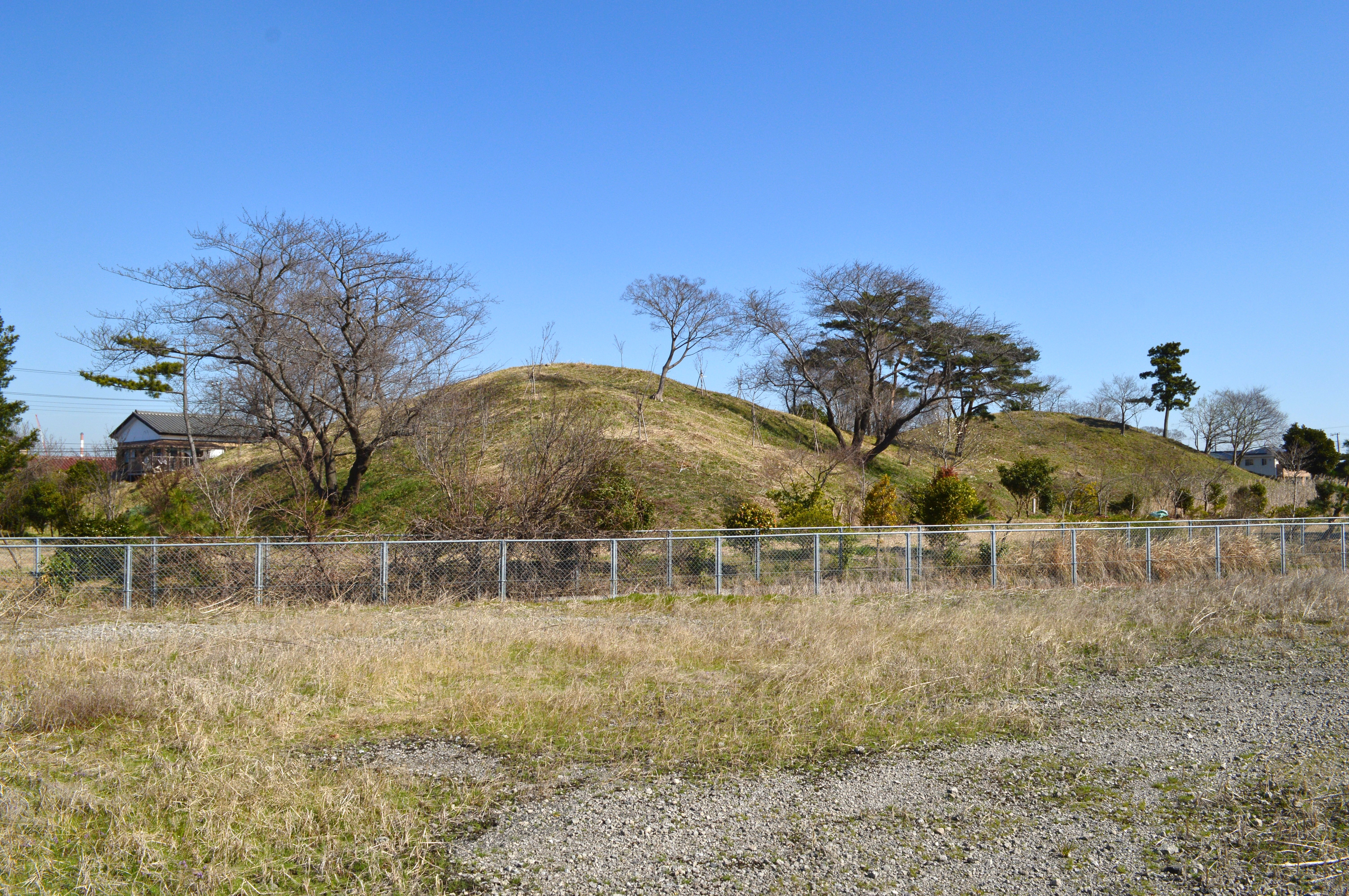 姉崎二子塚古墳 墳丘全景